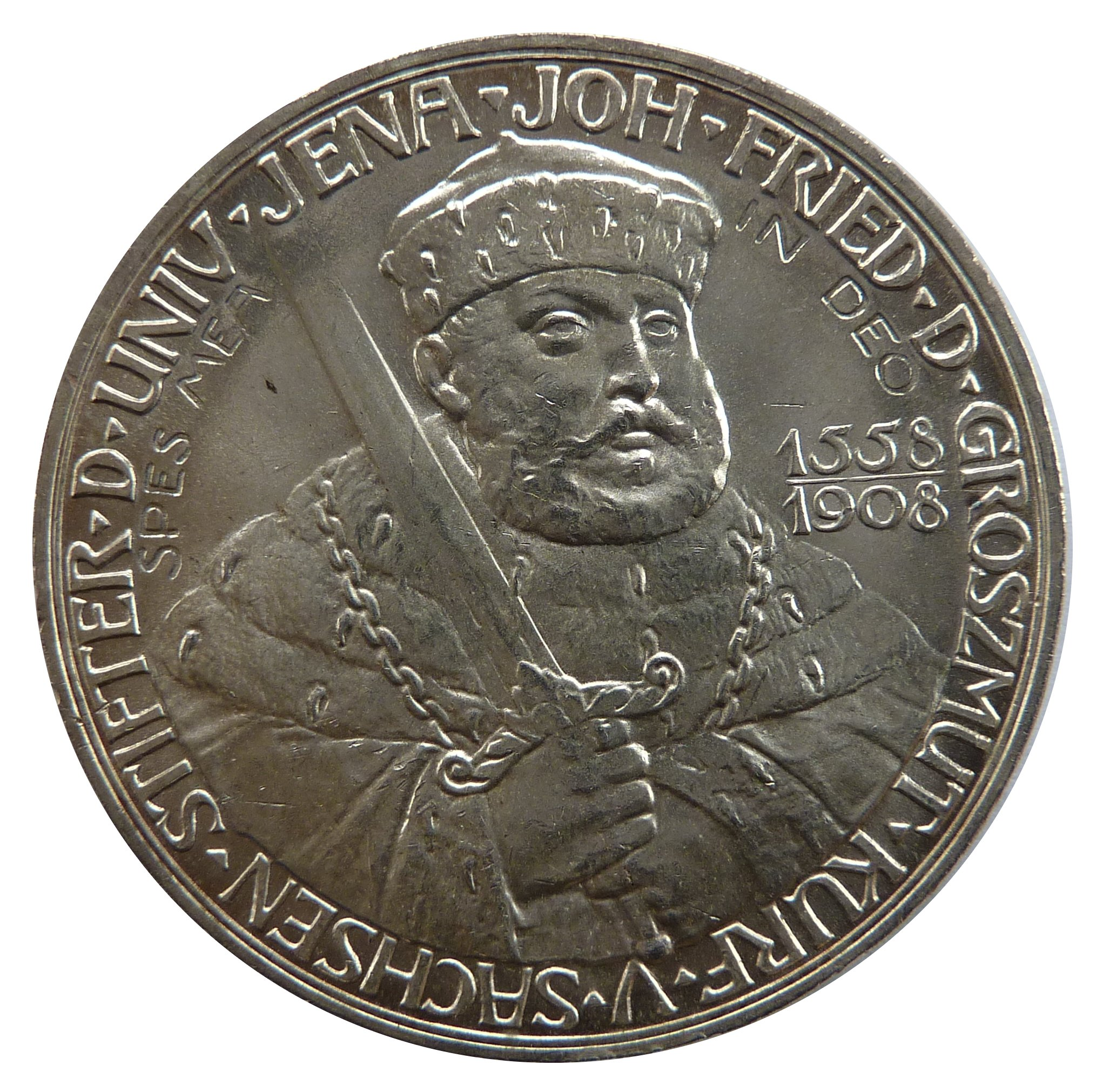 Vorderseite der 5-Mark-Gedenkmünze Sachsen-Weimar-Eisenachs anlässlich dem 350jährigen Jubiläum der Universität Jena